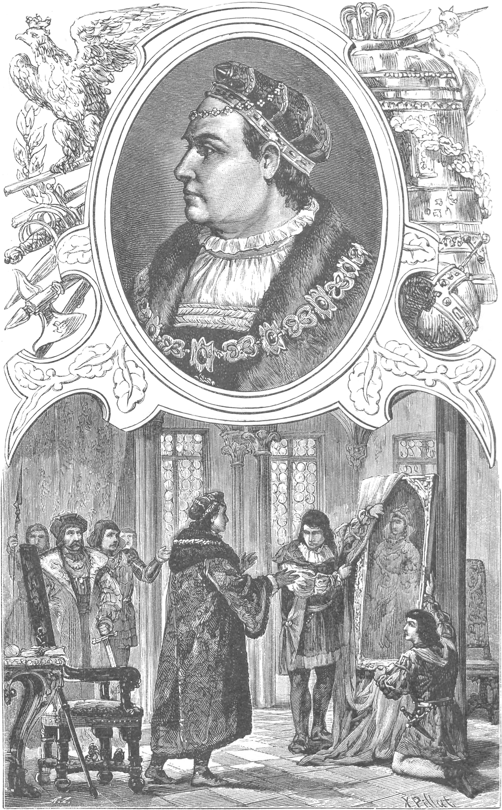 ilustracja z książki „Wizerunki książąt i królów polskich“